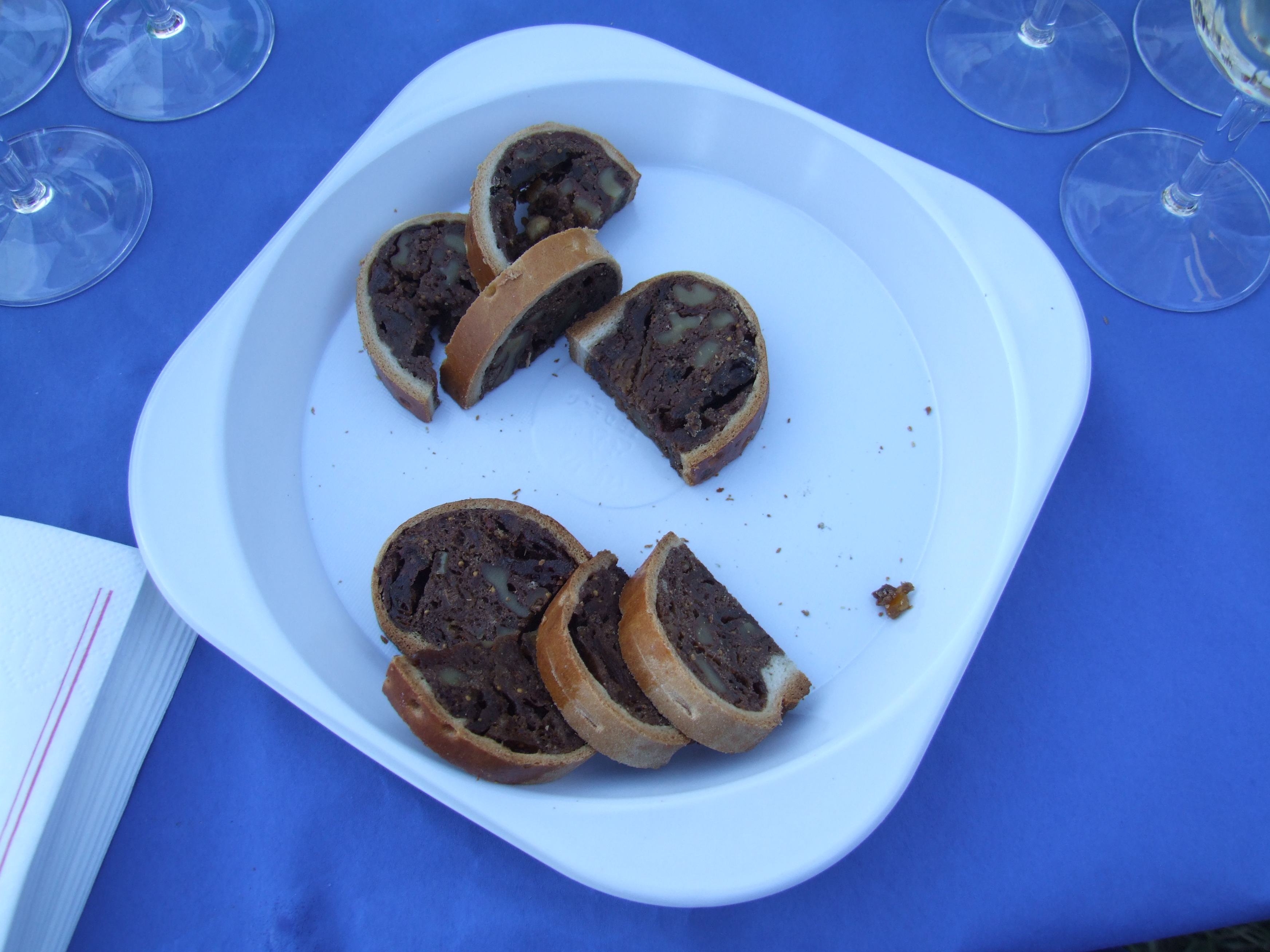 Eine Spezialität aus Graubünden: Birnenbrot ; Hier serviert für die Premierengäste der Heidi-Freilichspiele in Maienfeld auf der Heidialm (1111 müNN). Gereicht wurden noch Salsiz und Käse sowie Maienfelder Wein.